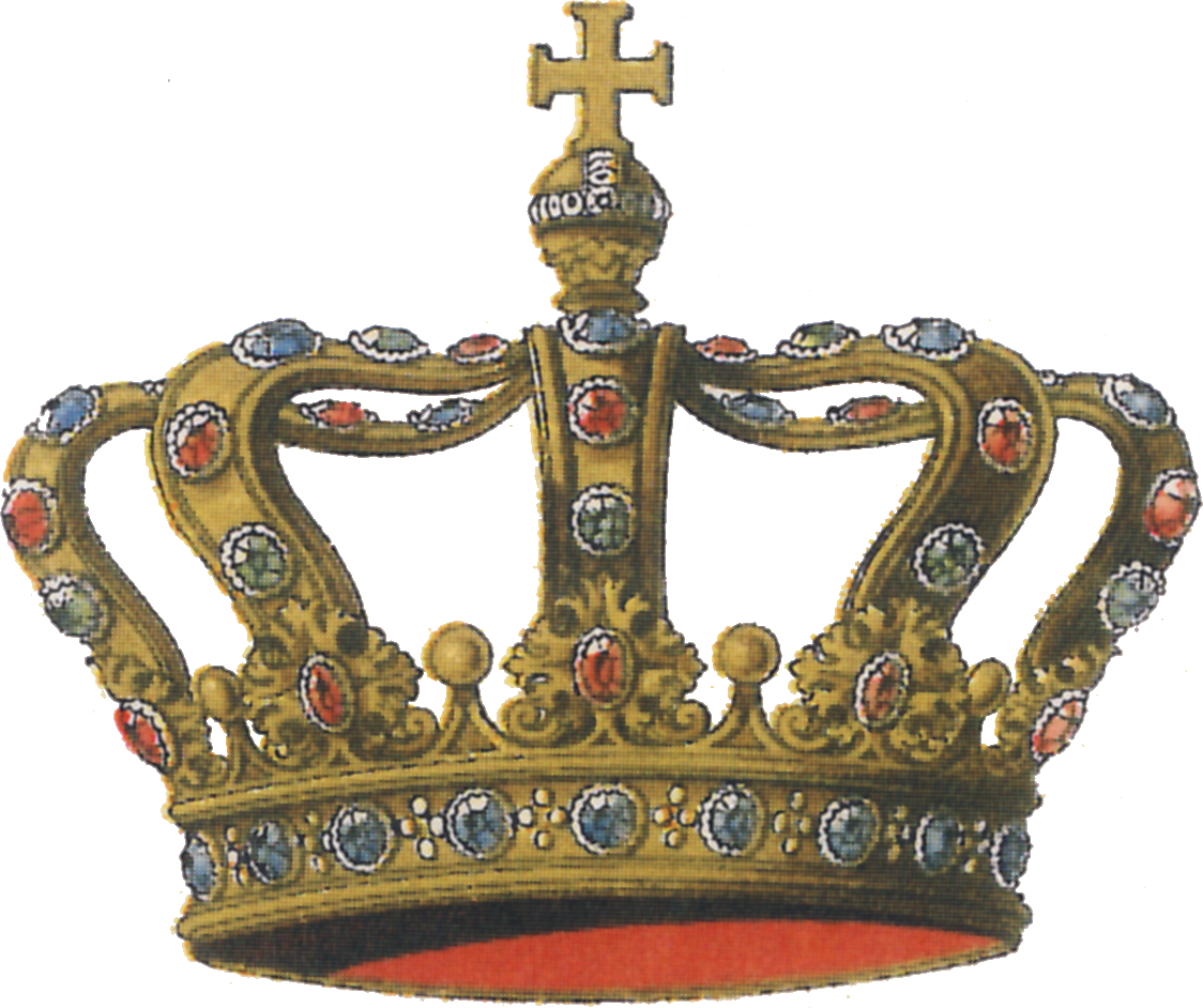 "Fig. 9. Königskrone von Bayern. Diese Krone besitzt die übliche Form der Königskronen, nur sind die Bügel nicht mit Perlen, sondern mit Edelsteinen geschmückt. Die Krone von Bayern wurde zu Beginn dieses Jahrhunderts [Anm. 19. Jhdt.] durch Vermittlung des Hofjuweliers Borgnis in Frankfurt a. M. in derselben Pariser Werkstätte entworfen und angefertigt, aus welcher auch die Kroninsignien Napoleons I. hervorgingen. Sie wird in der Schatzkammer der Residenz zu München aufbewahrt."